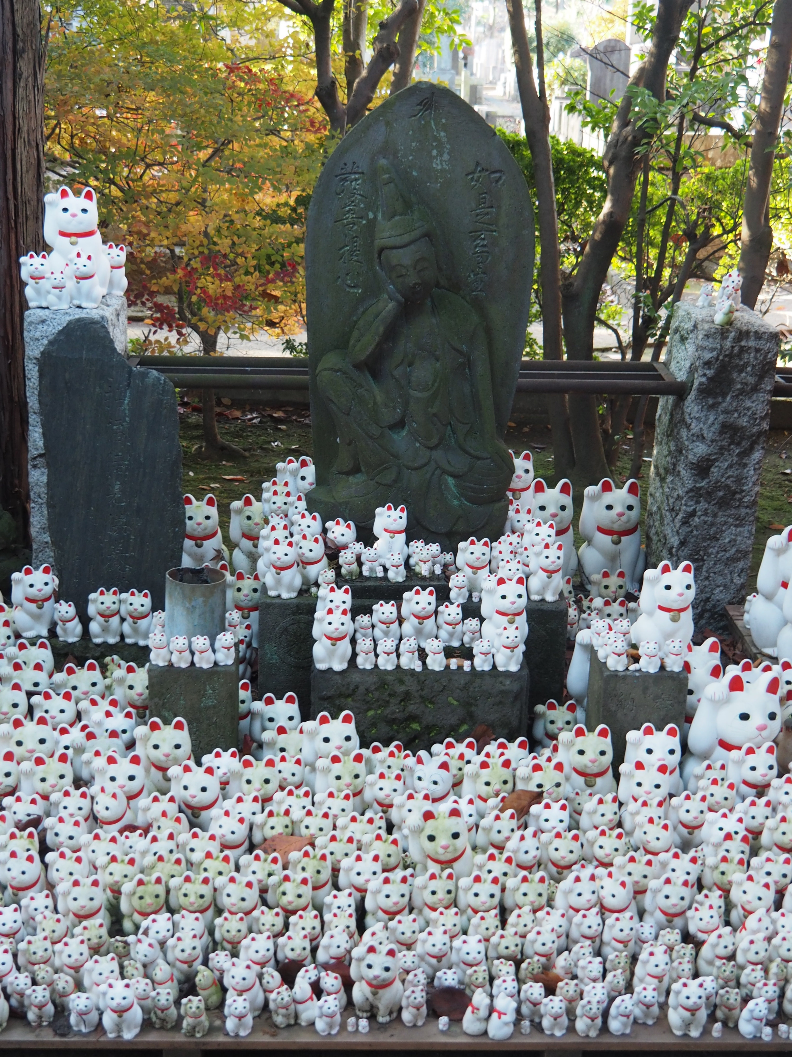 Gotokuji Temple